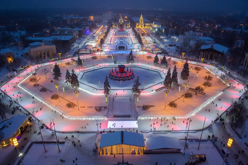 Ice rink in VDNKh, Moscow